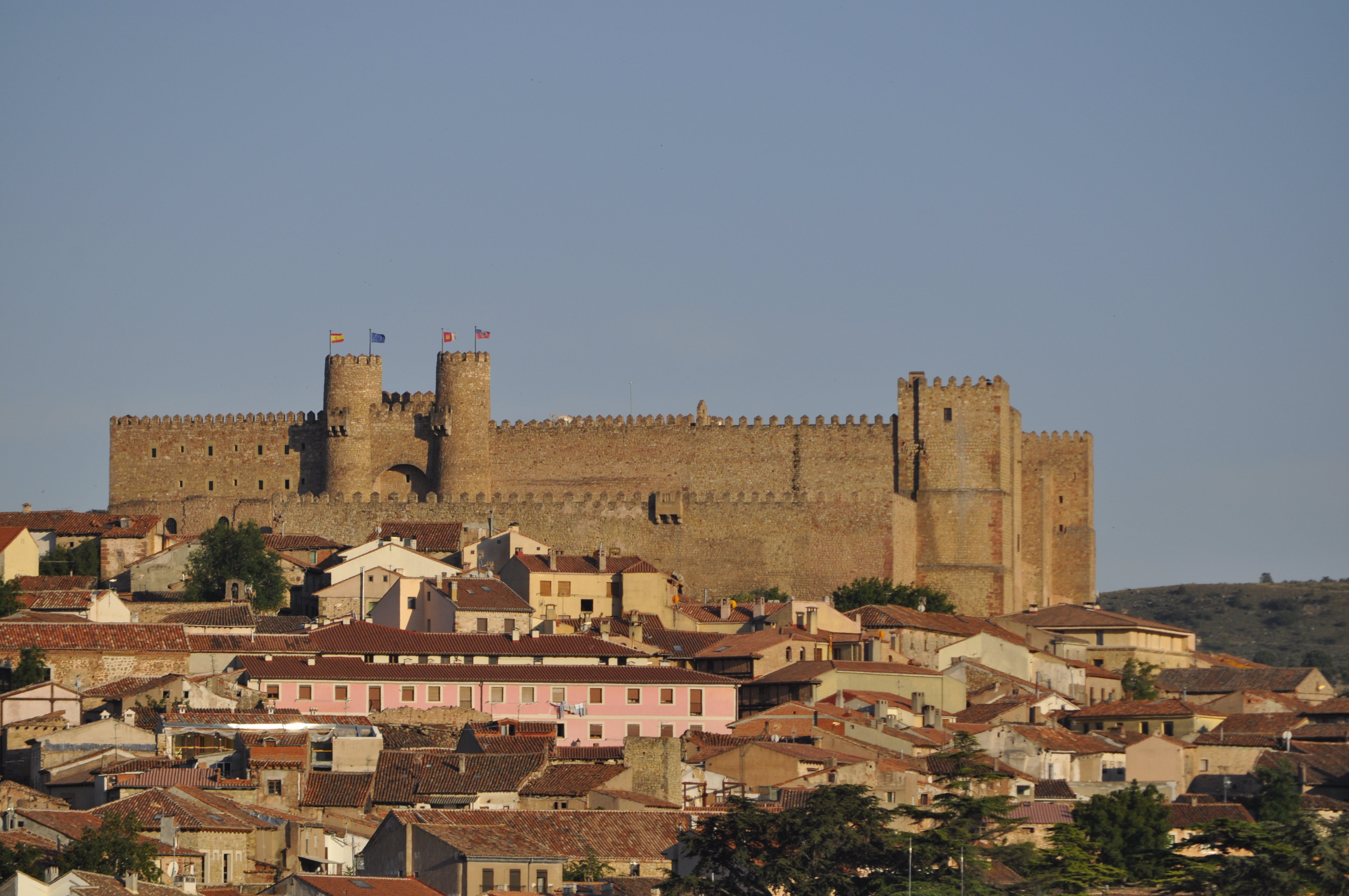 Castillo de Sigüenza convertido en Parador Nacional See also: Castles in Spain.